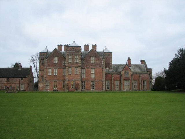 Kiplin Hall - lake side view